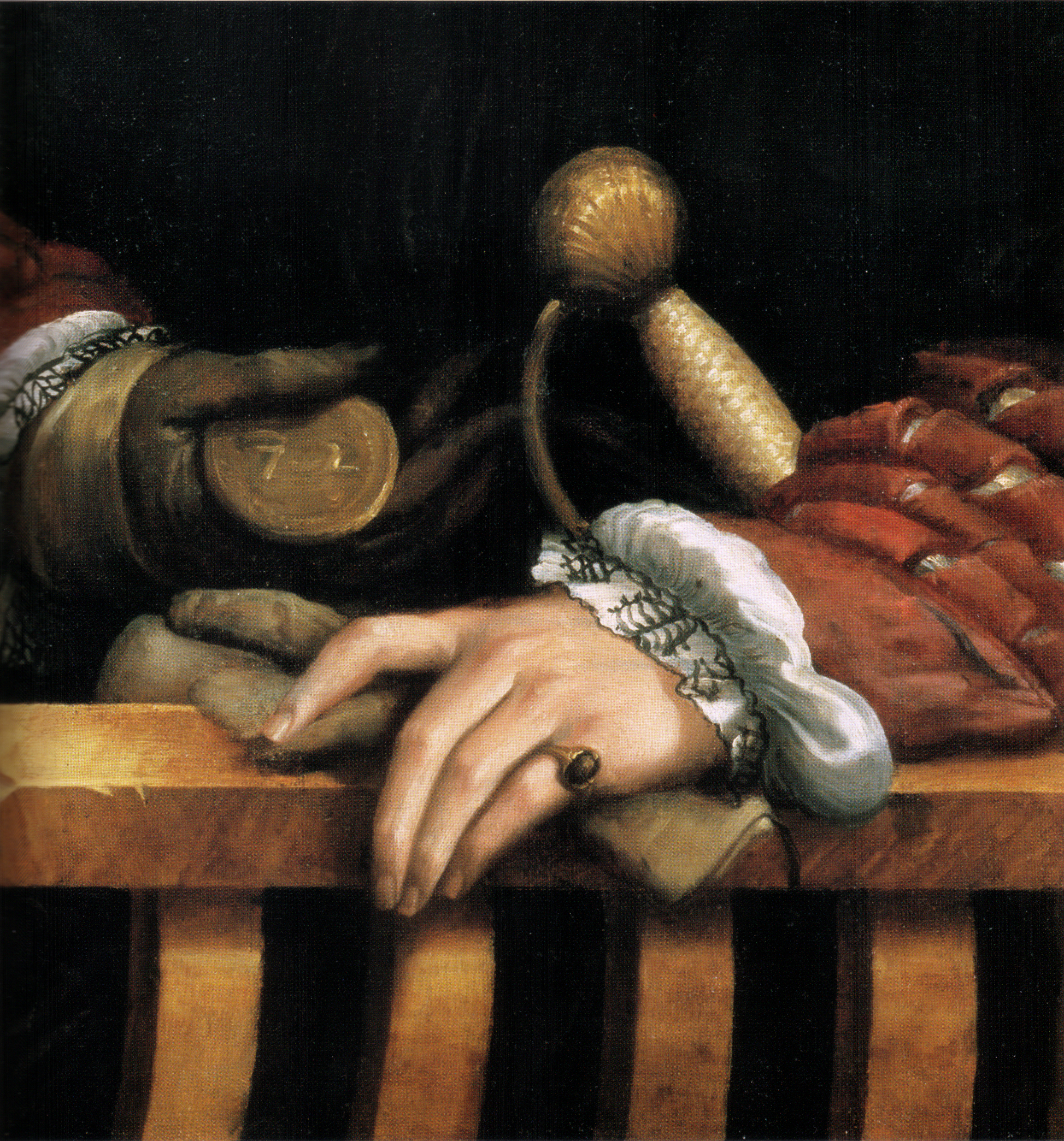 detail